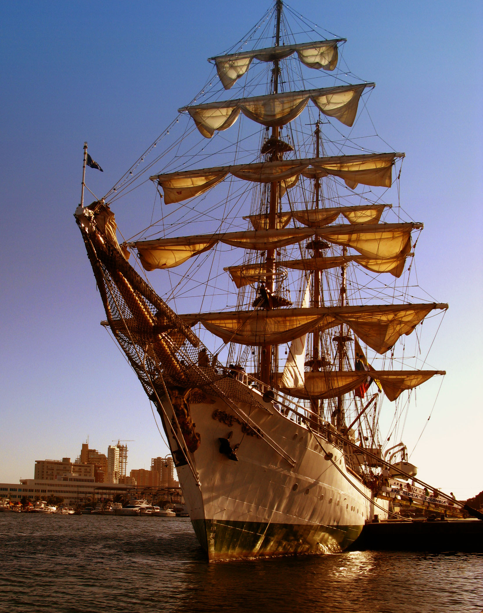 ARC gloria, armada colombiana, Cartagena